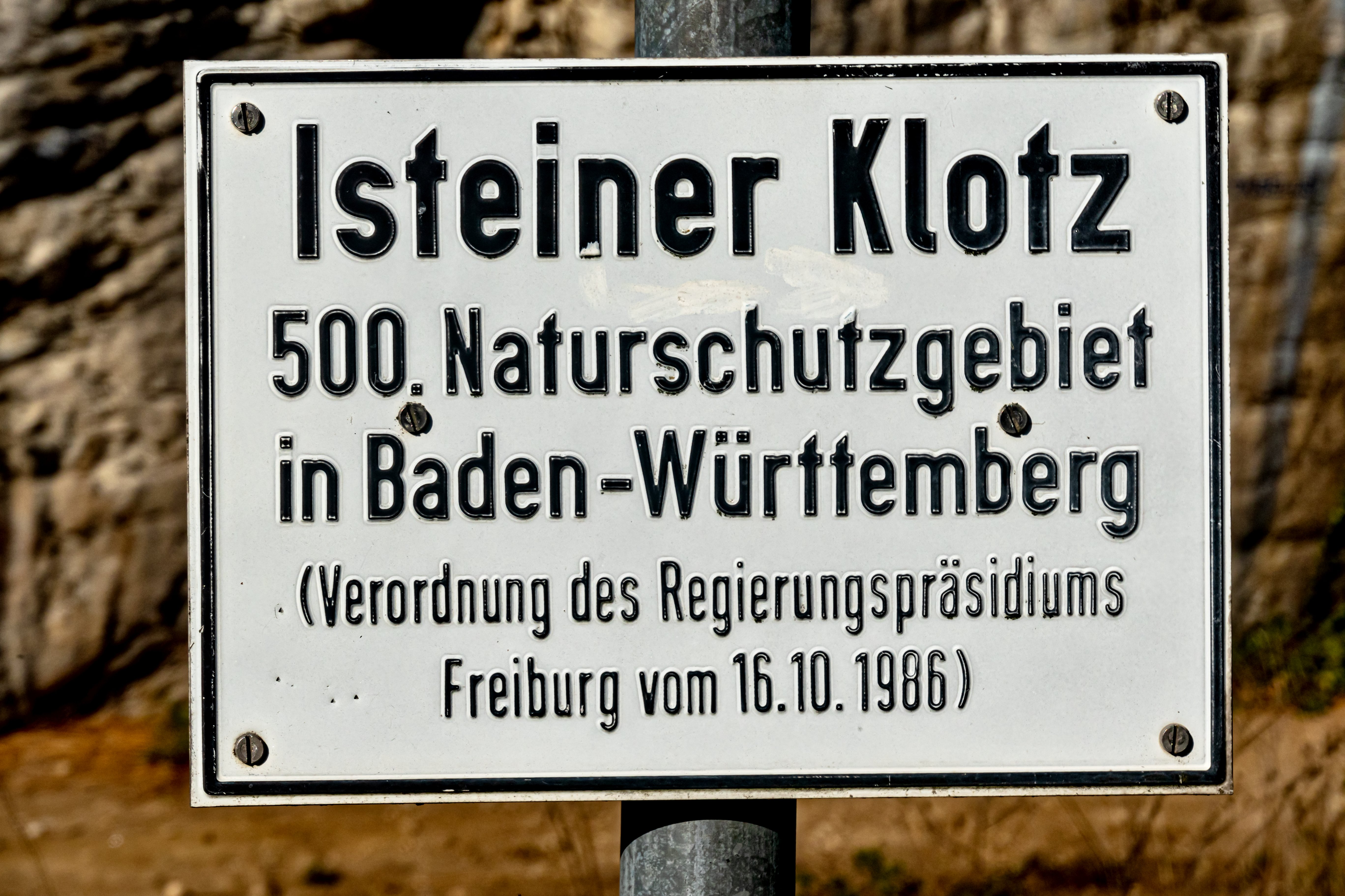 Bilder vom Isteiner Klotz am 20. 10. 2019